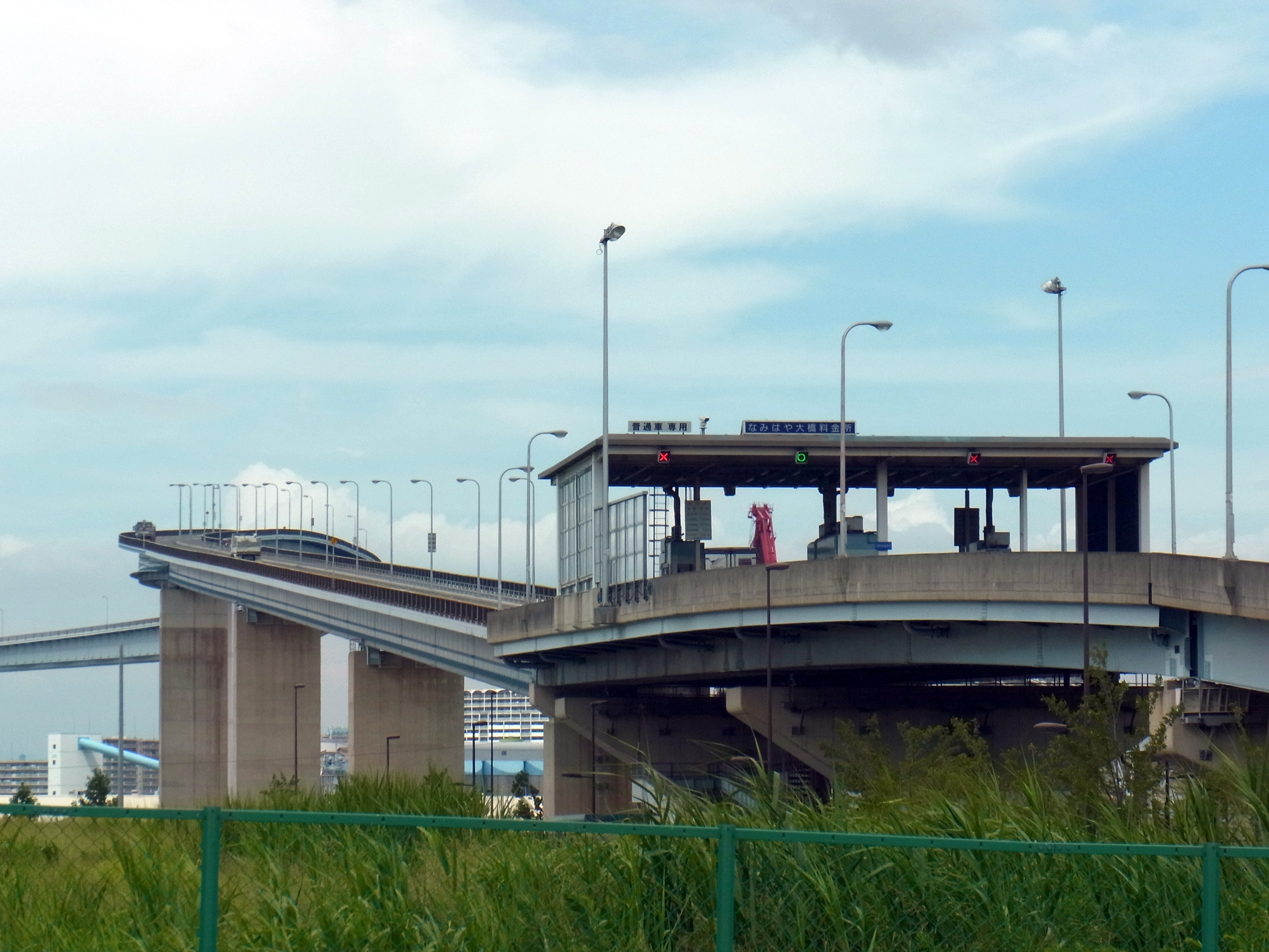 なみはや大橋料金所 Tollgate of Namihaya-ōhashi